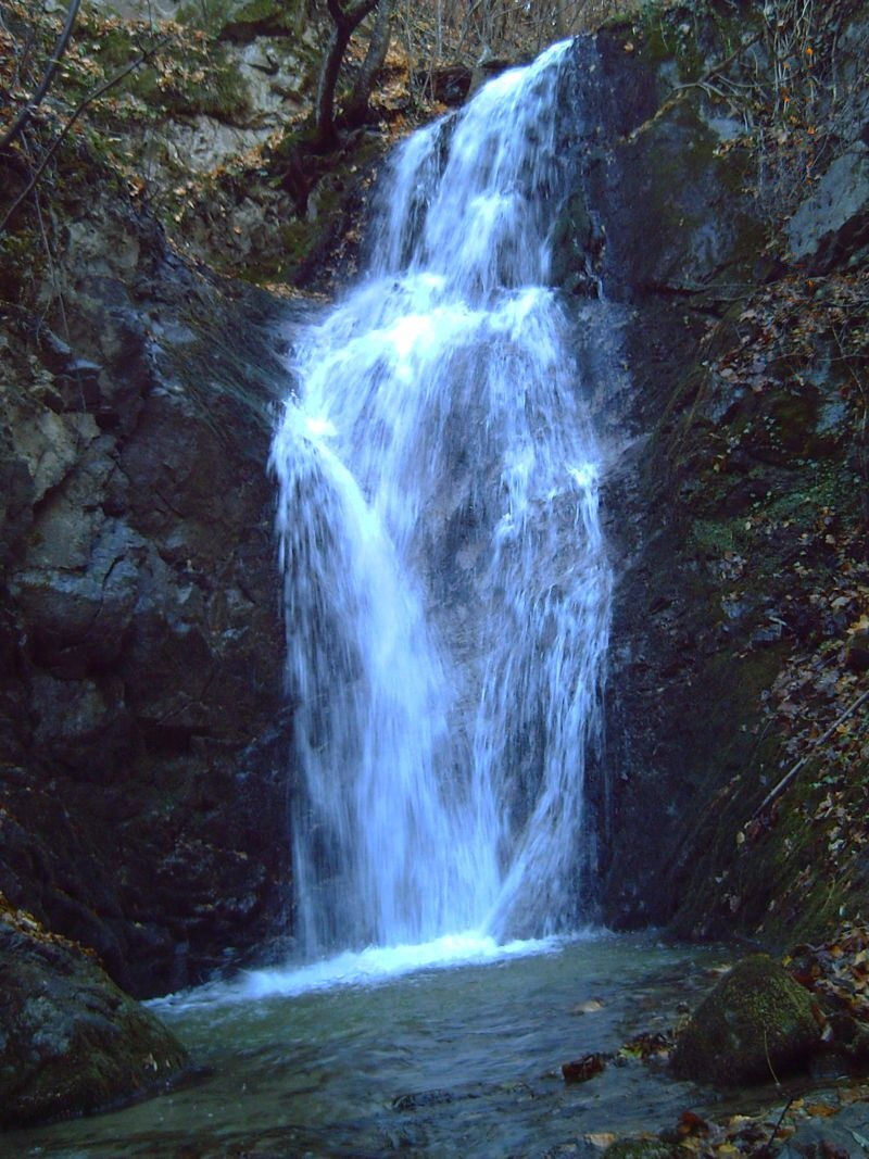 Големият водопад край село Добротино, България